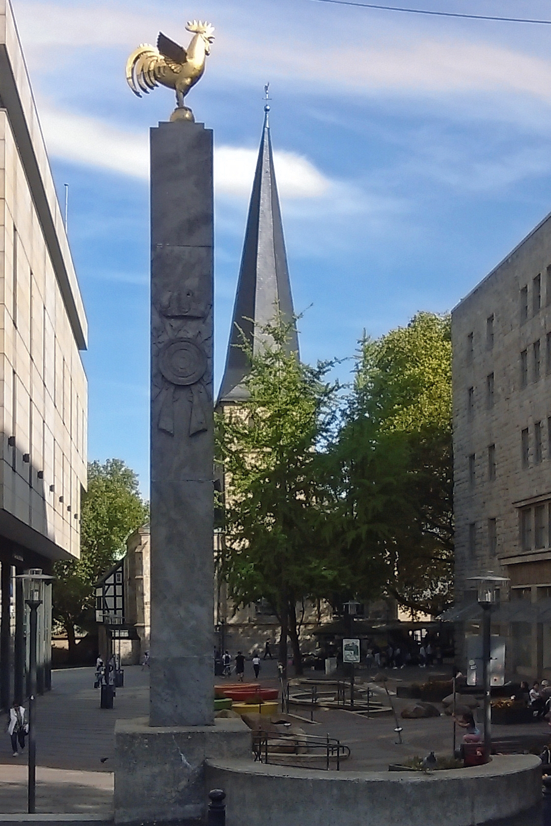 Essen-Stadtkern: Kardinal-Hengsbach-Platz, Denkmal Wachsames Hähnchen, errichtet 1930